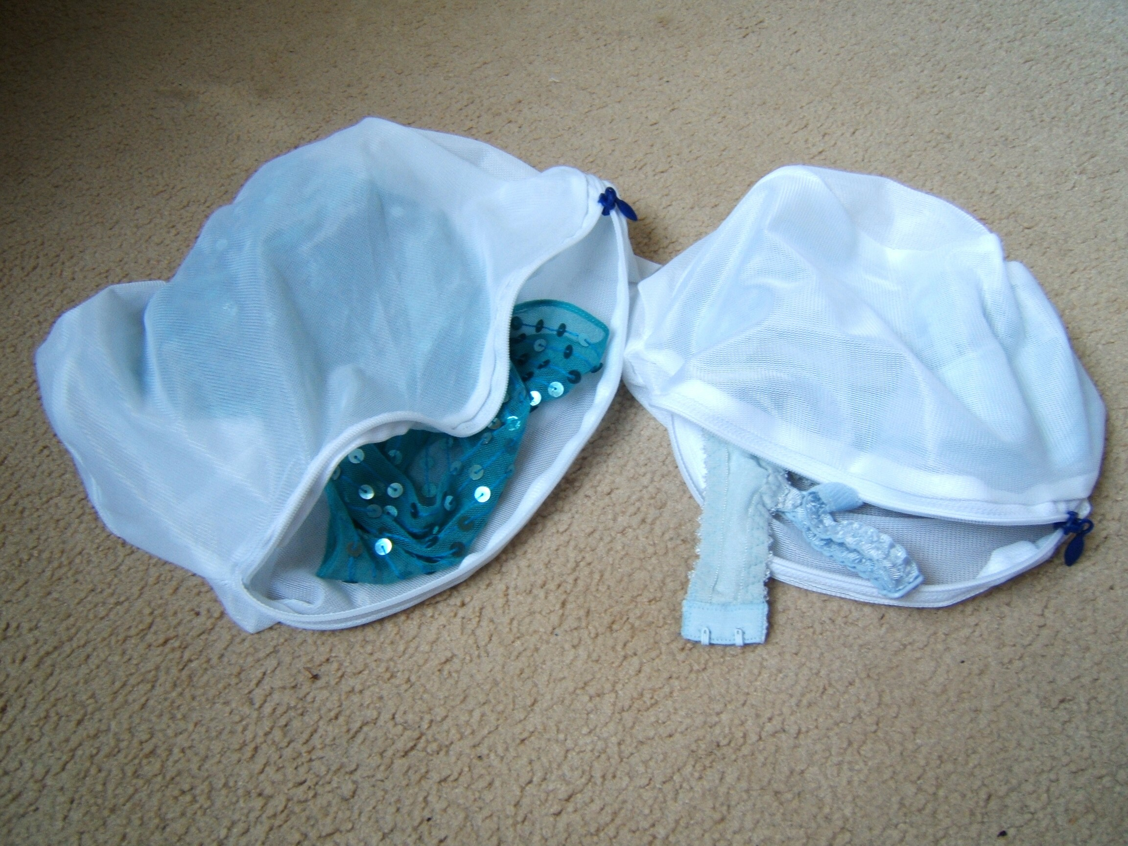 Waszakjes, geopend met kleding